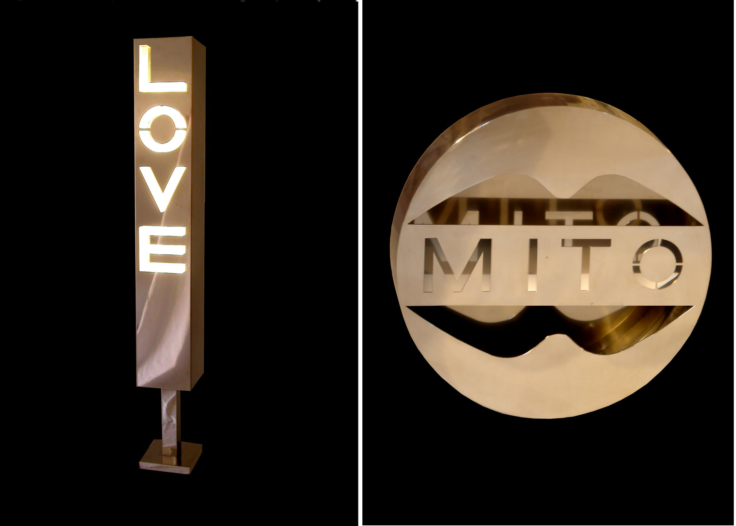 Totem Love. acciaio, plex e luce Mito: acciaio e luce Opere di Oreste Ruggiero